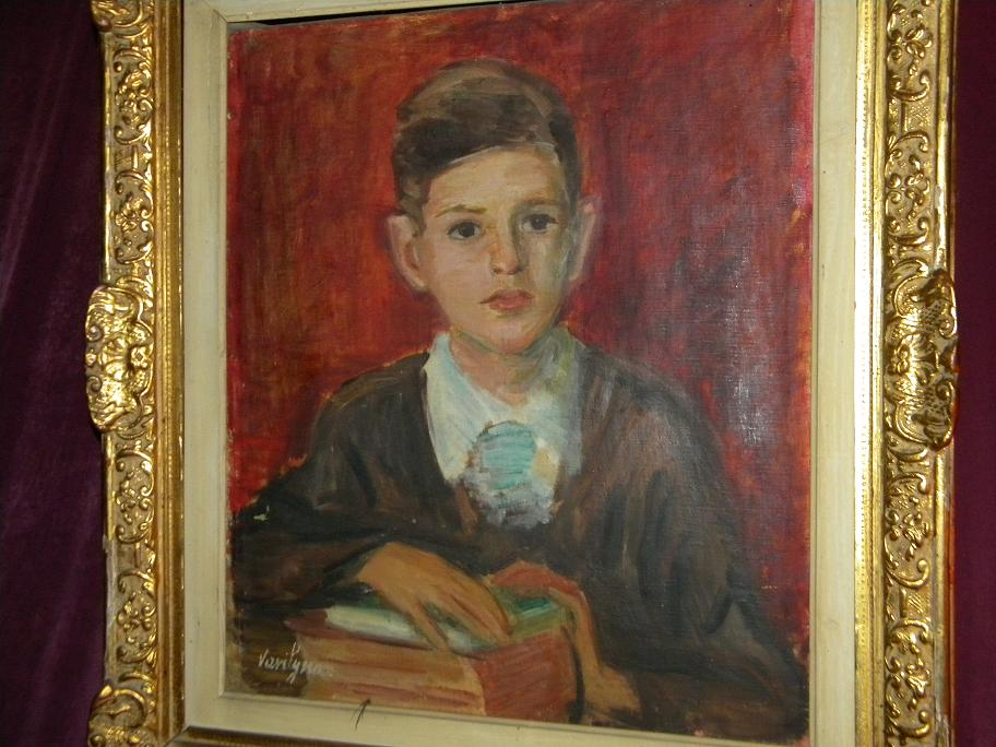 Dan Iagnov adolescent intr-o pictura de Vavylina (Colecția particulară de fotografii Dr. Brițchi Mirela)